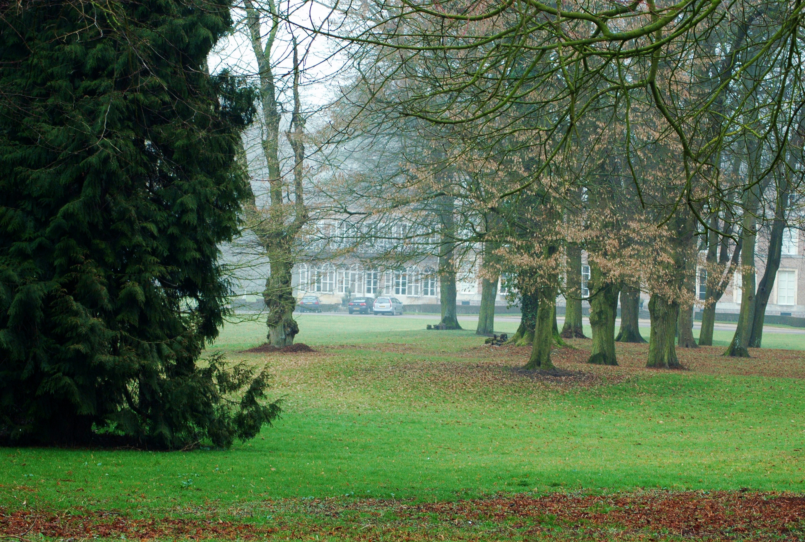 Querrieu (Somme, France). Le parc du château.